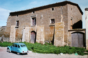 Imatge de Montcortès